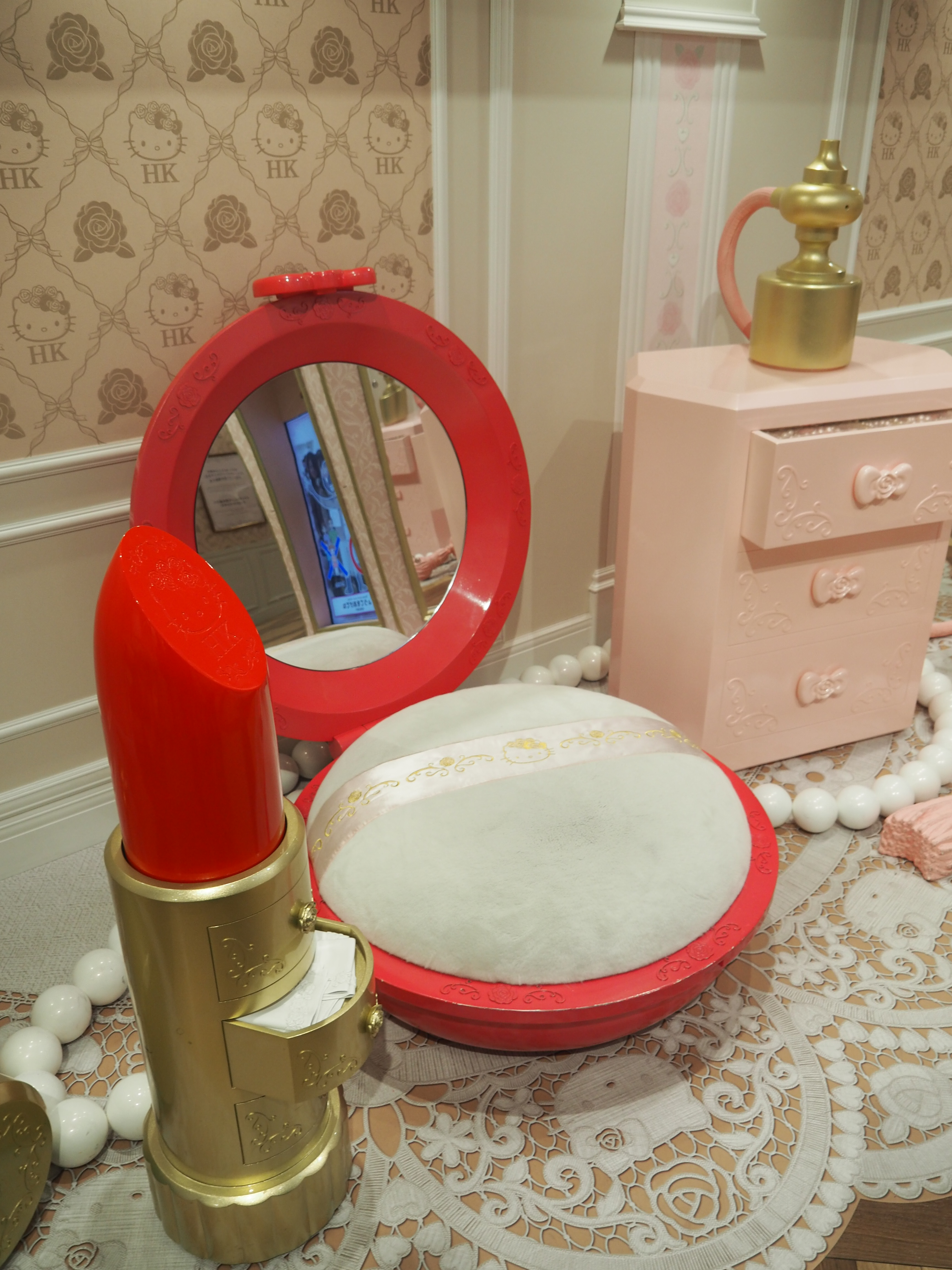 Sanrio Puroland